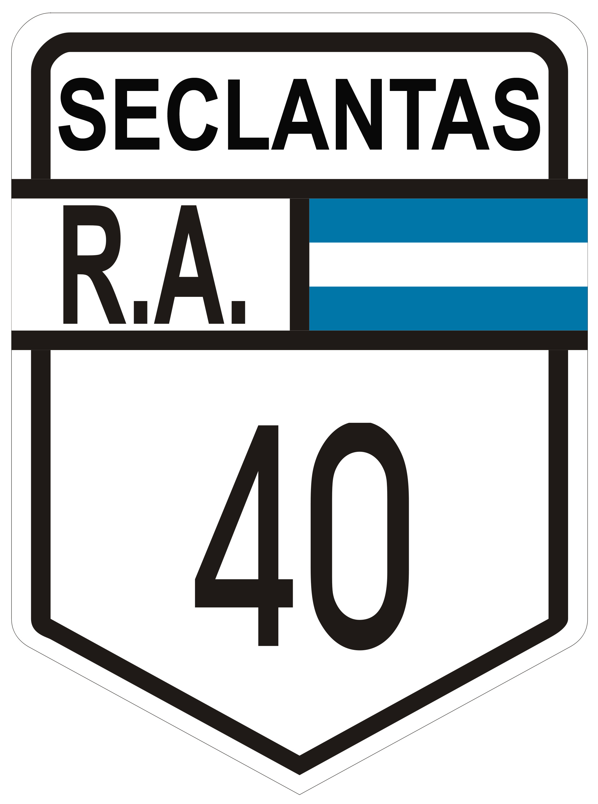 Seclantás - RN40